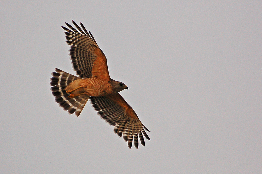 adult Buteo lineatus in flight